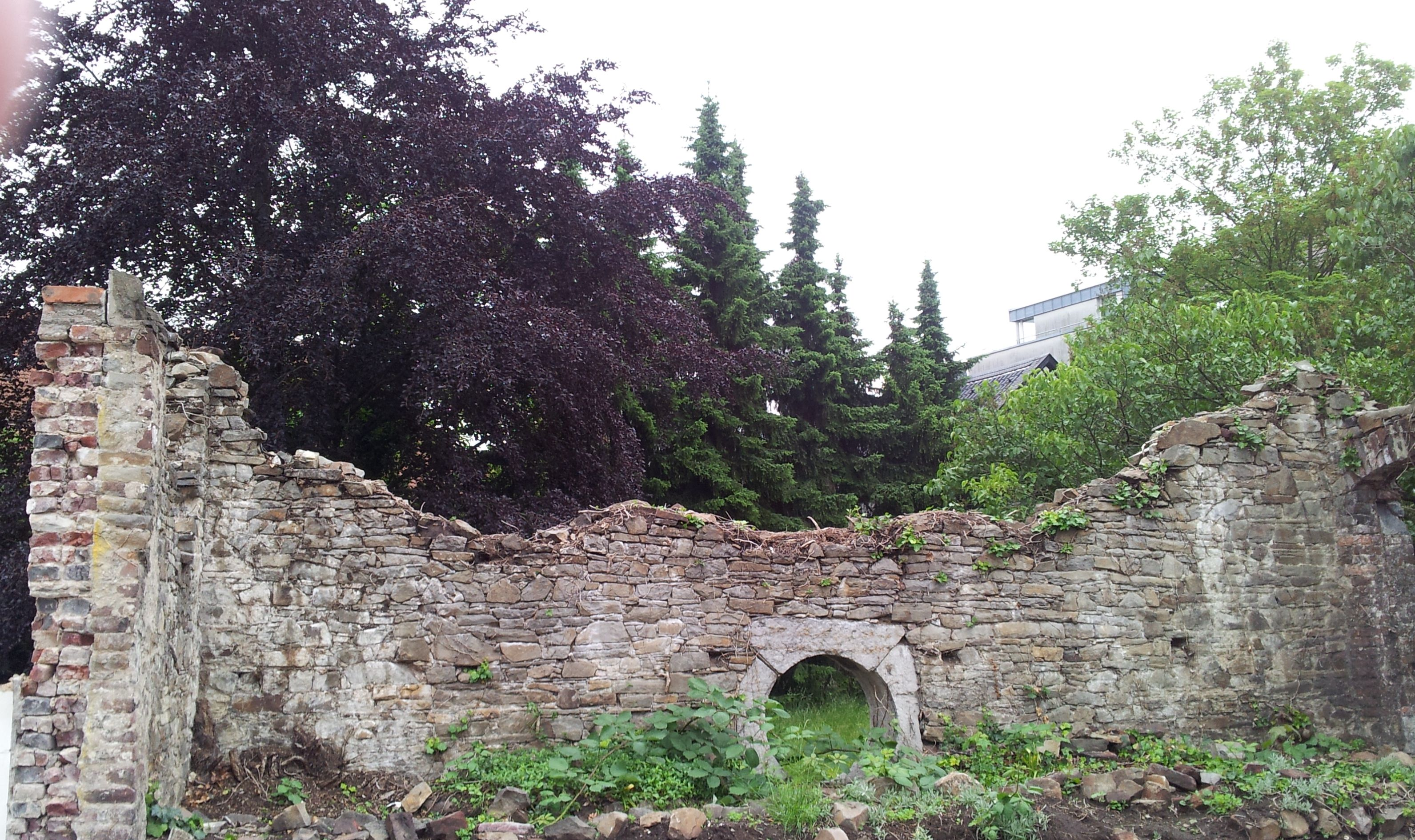 Hilden, Haus auf der Bech, ehemalige Ölmühle, Schwanenstraße